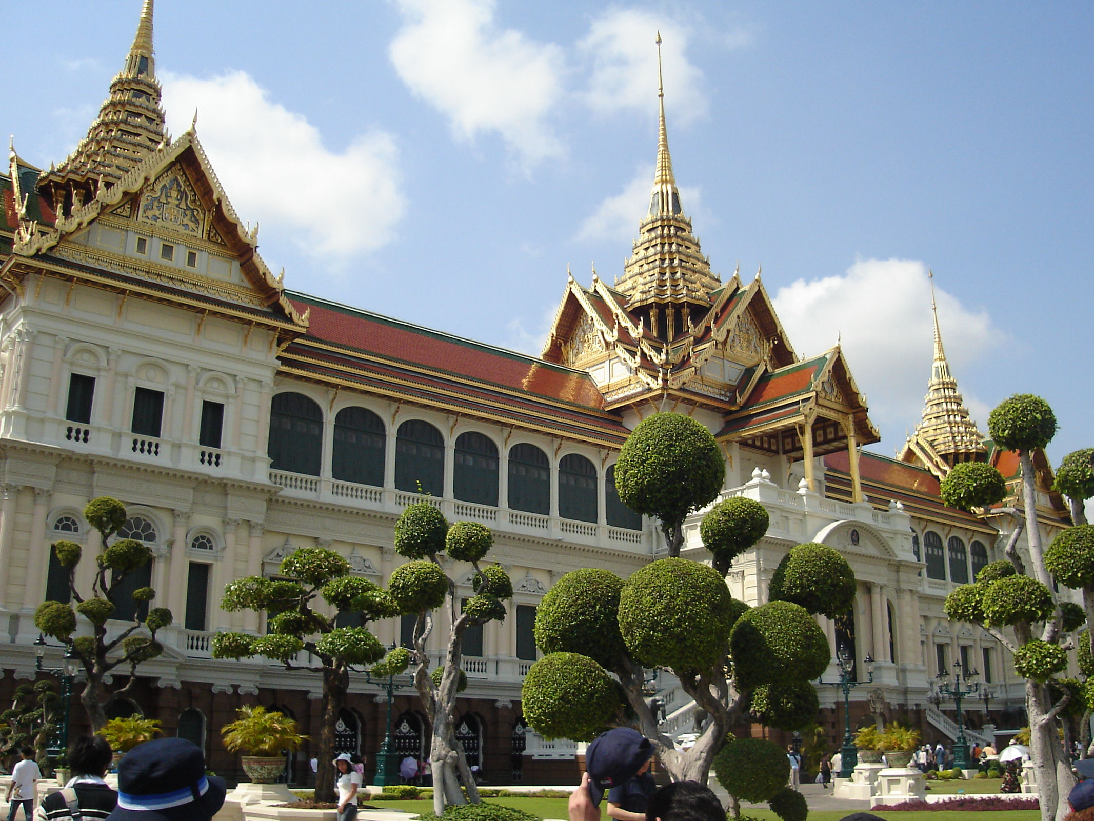 Chakri Maha Prasat Hall in Bangkok Thailand